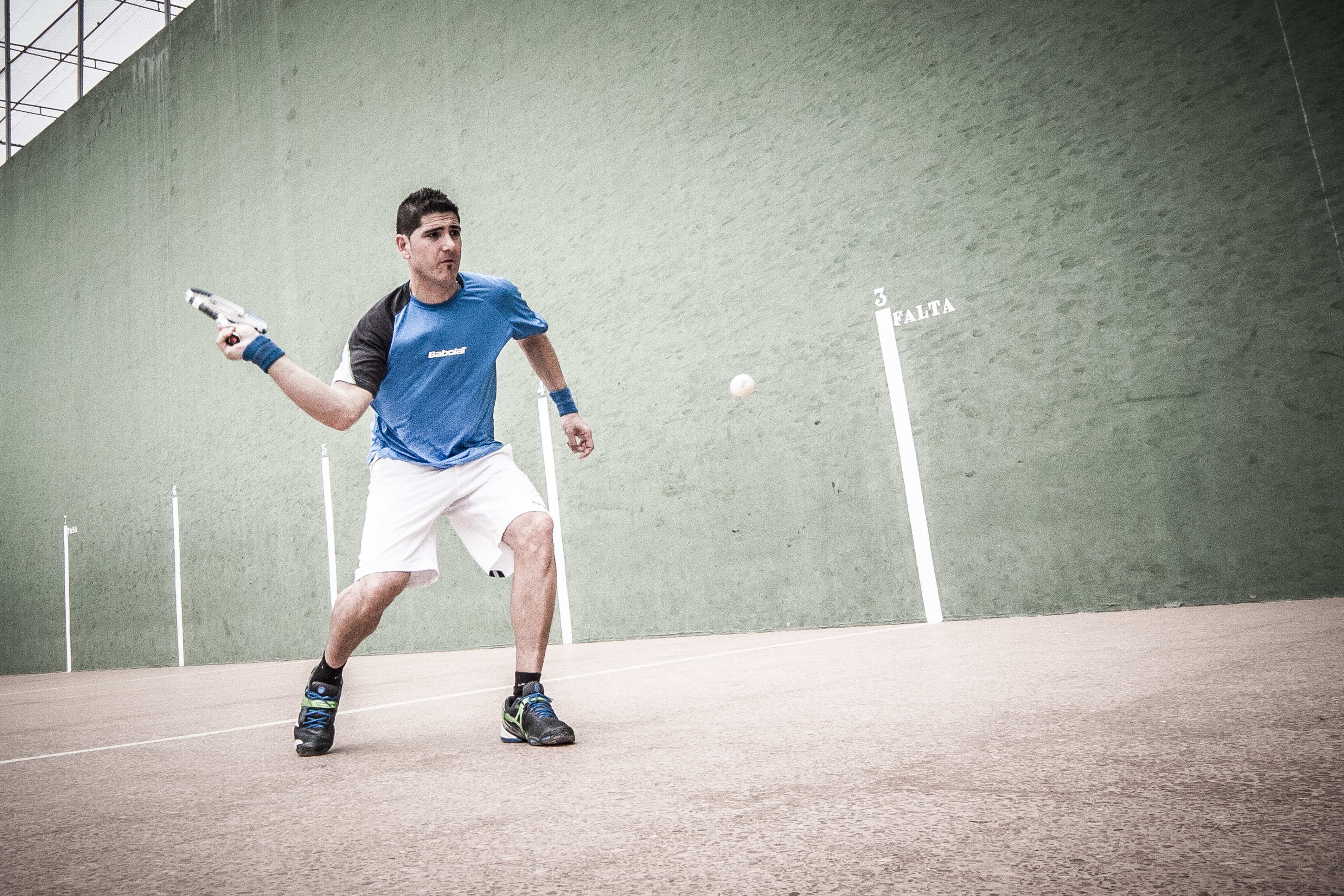 frontin